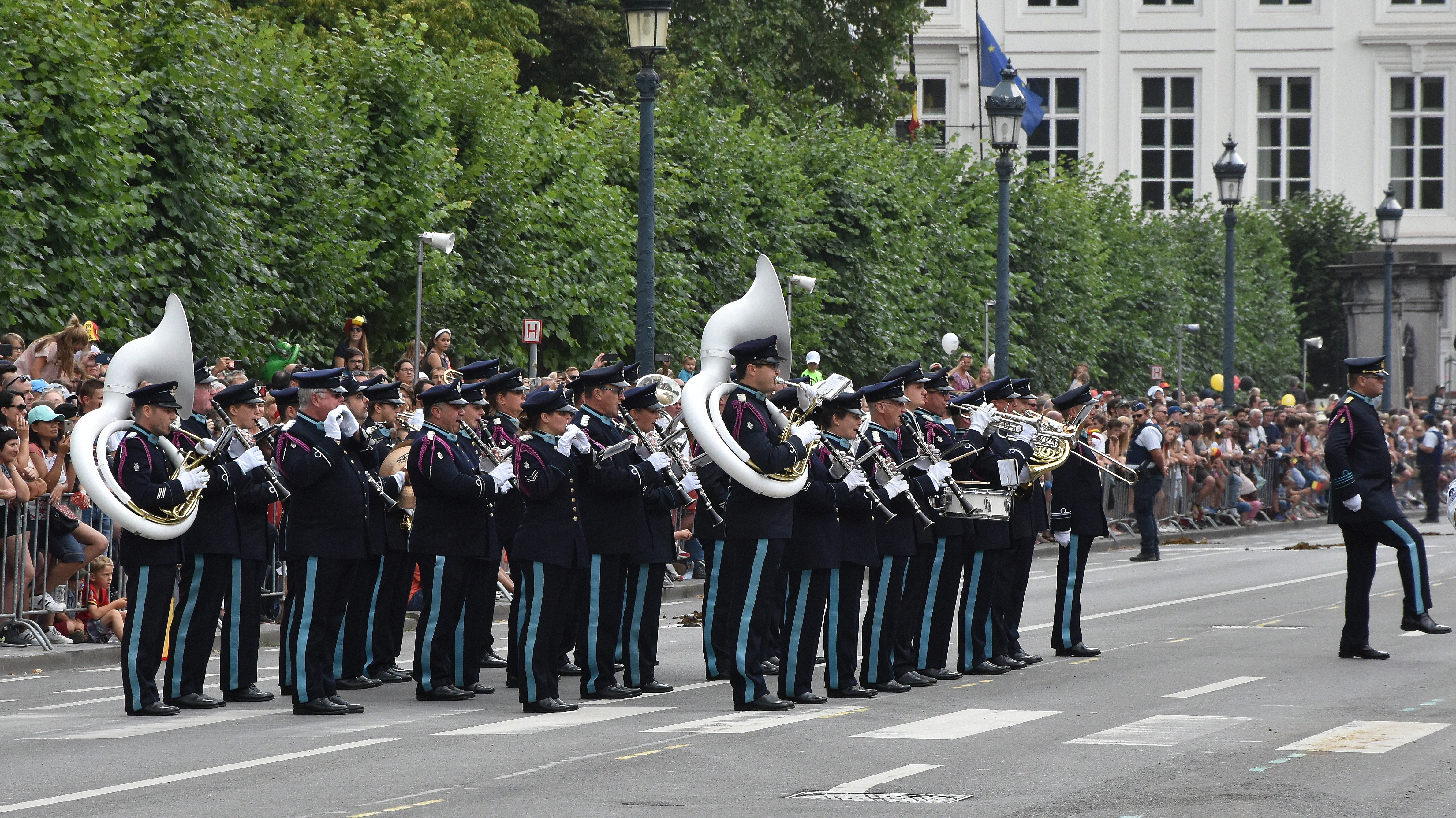 Royal Band of the Belgian Guides - Nationaal defilé 2018 21-07-2018 This photo of immaterial heritage has been taken in the Brussels Capital Region